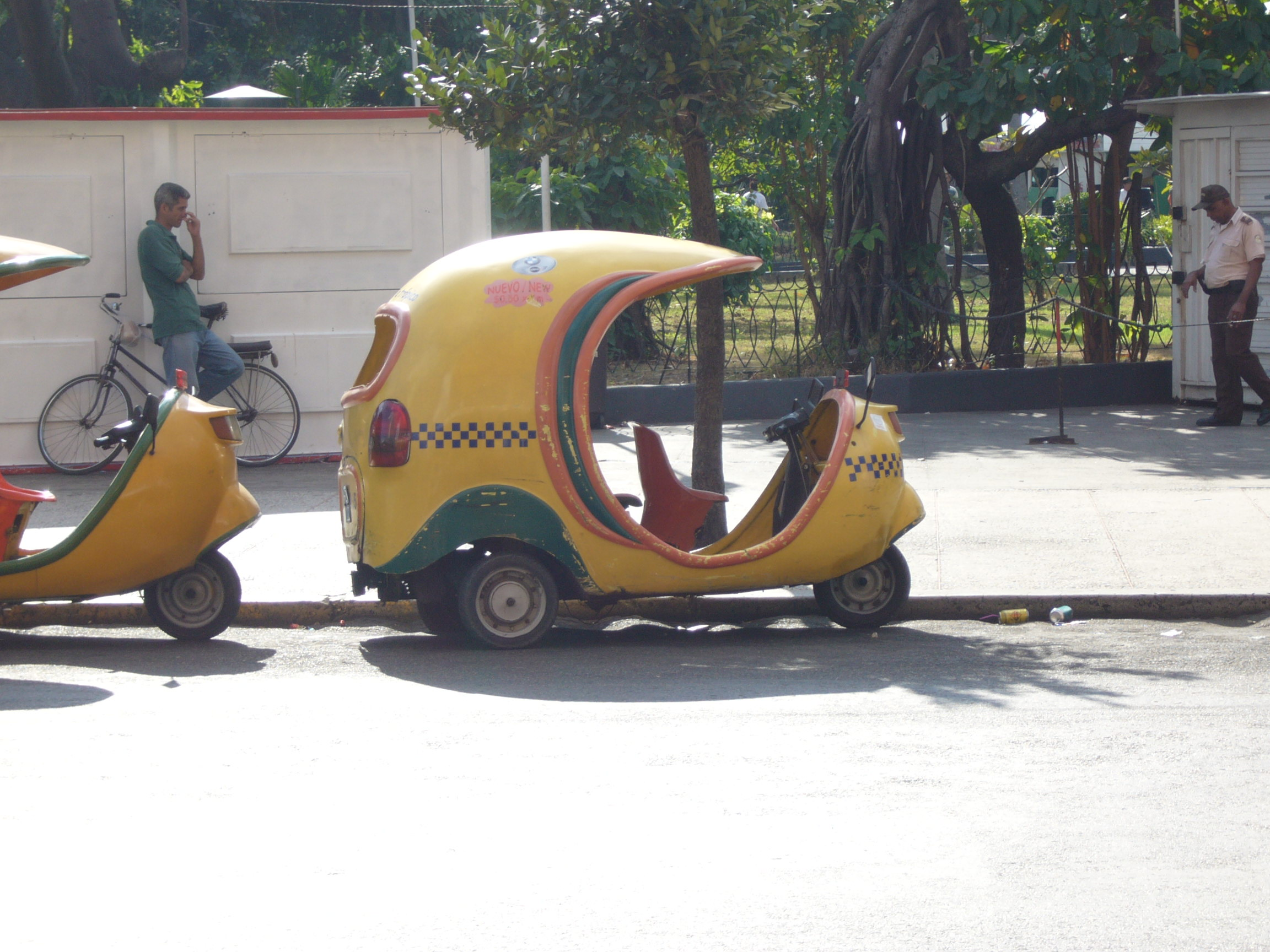 Coco taxi Havannassa joulukuussa 2005.